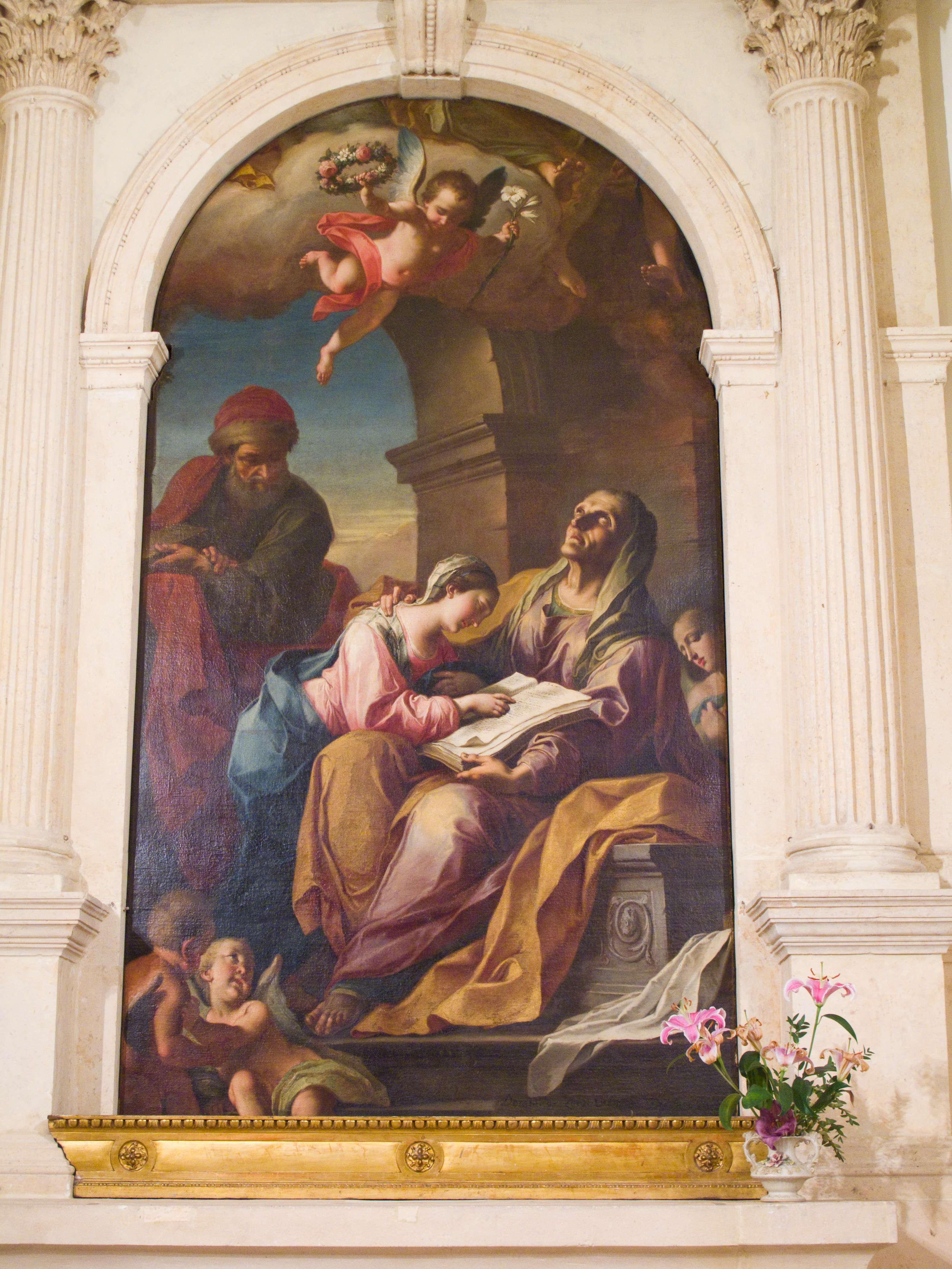 Vicenza - Chiesa di Santa Corona - Maria apprende la lettura